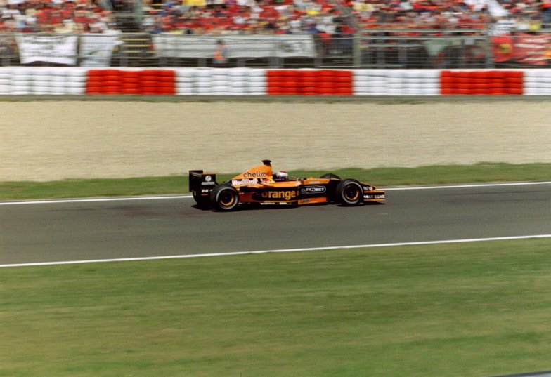 Verstappen European Grand Prix 2001